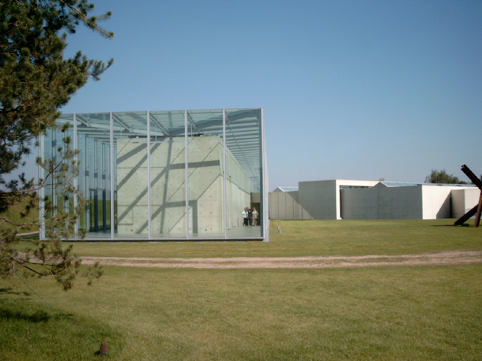 Museum Langen Foundation in Raketenstation Hombroich, bij Düsseldorf Museum Langen Foundation auf der ehemaligen NATO-Raketenstation Hombroich, südlich von Düsseldorf; hier links die Rückseite des Glasquader-Ausstellungsgebäudes mit den japanischen/asiatischen Exponaten, rechts der abgesenkte Gebäudetrakt für neuere Kunst